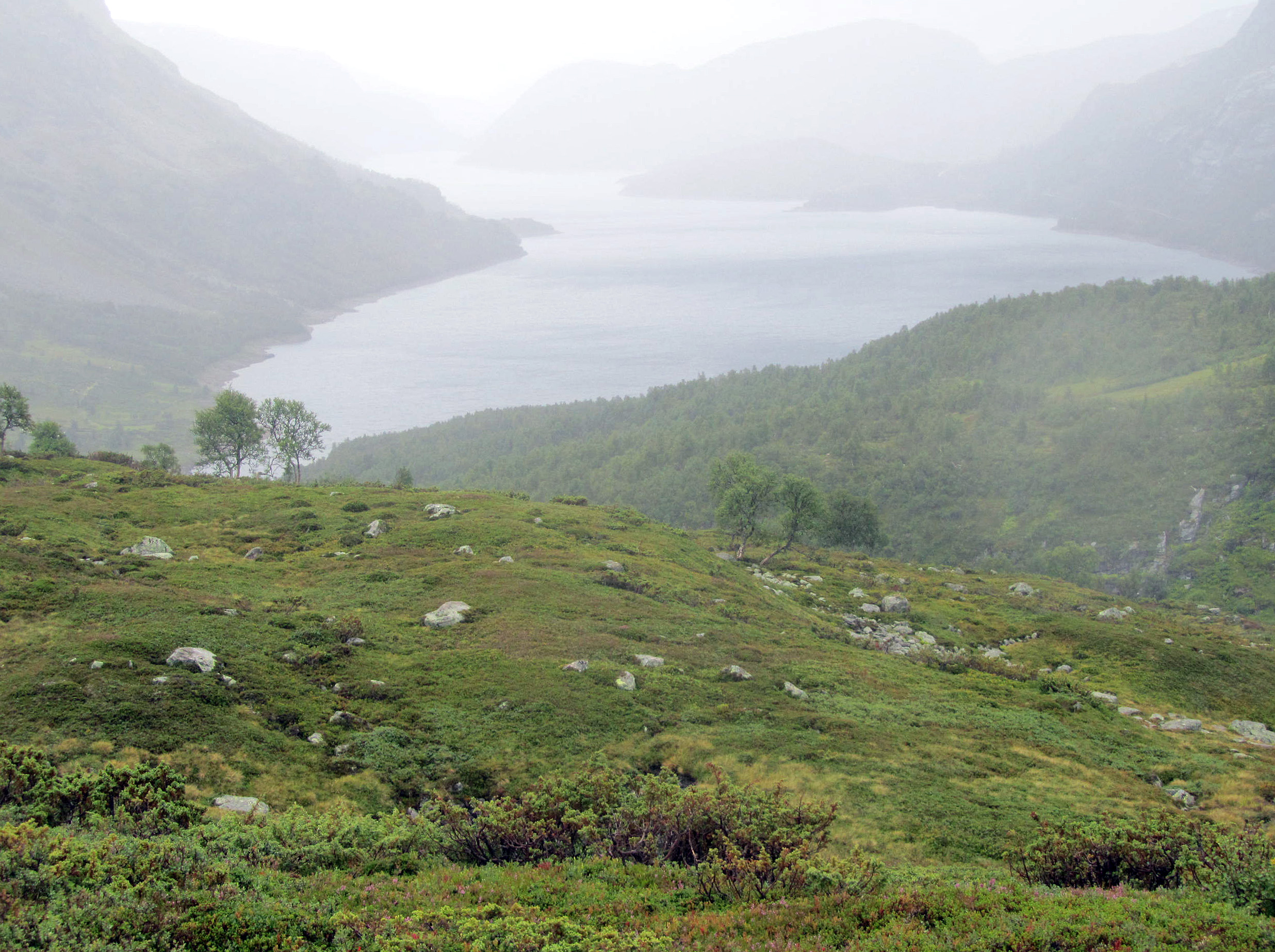 Valldalsvatnet i regndis set fra nord